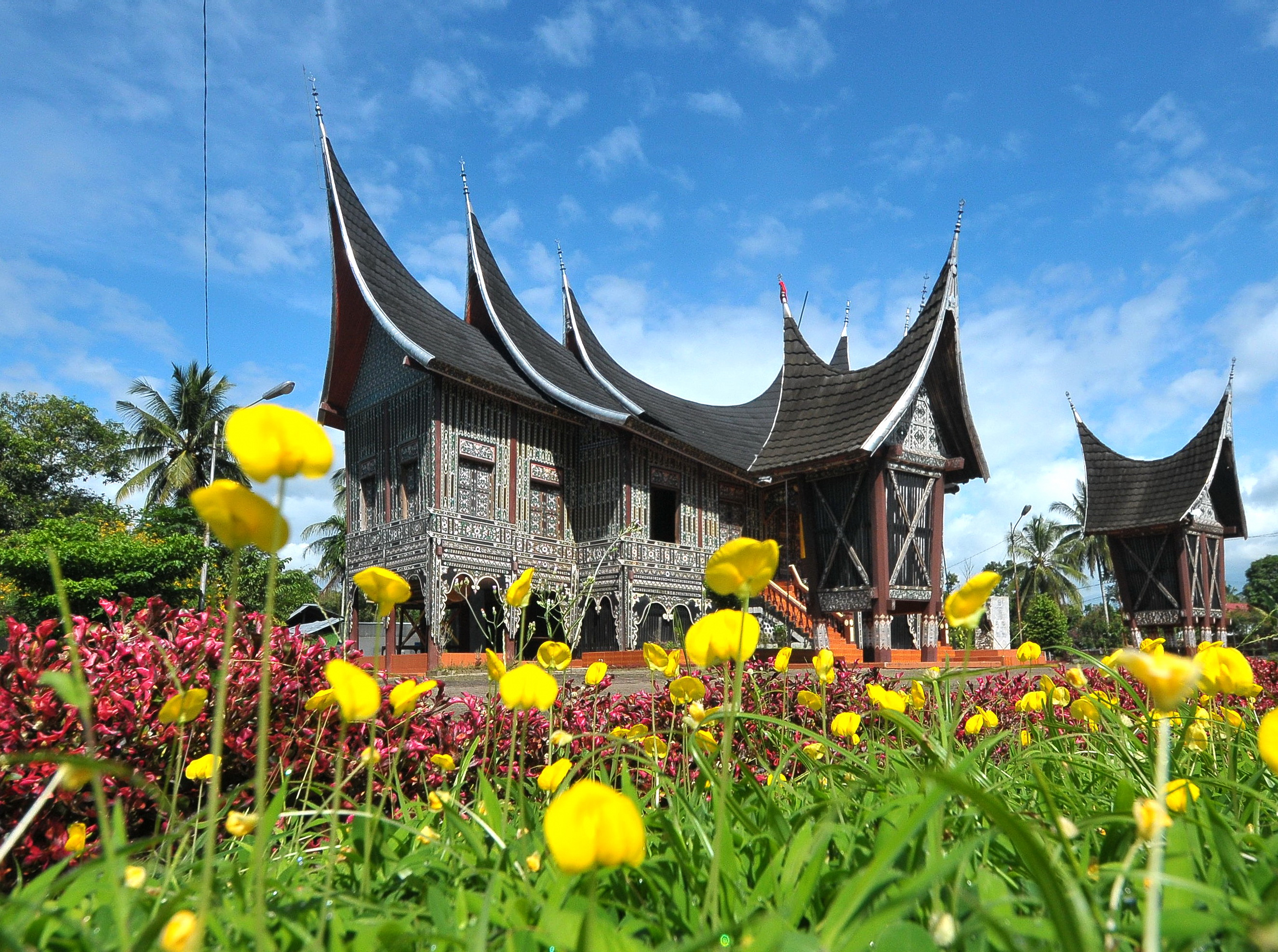 Istano Silinduang Bulan, adalah rumah gadang yang sangat khusus dengan model alang babega. Mempunyai tujuh buah gonjong (tajuk) yang megah seakan mencucuk langit. Model alang babega merupakan khas rumah gadang raja.Lokasi di Pagaruyuang Batusangkar, Sumaetra barat